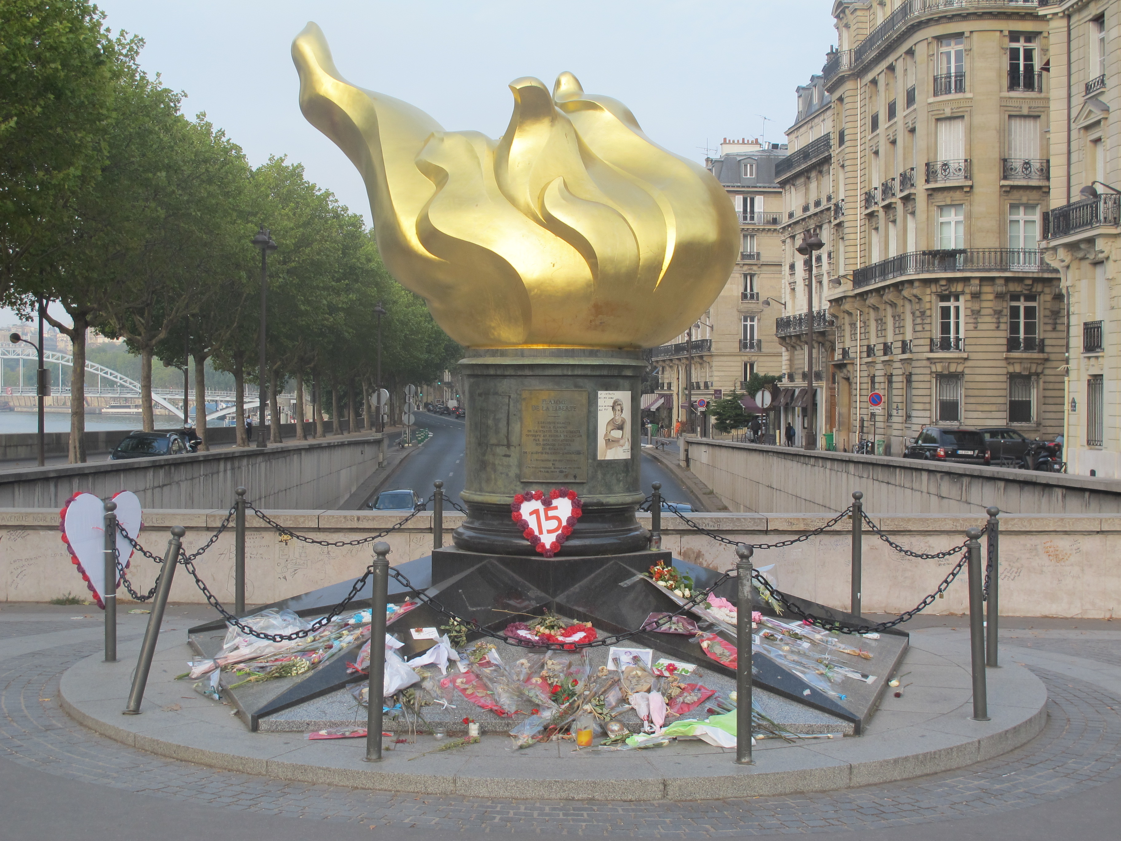 Flamme de la Liberté, par Auguste Bartholdi (1834-1904), place de l'Alma, Paris 16e. Réplique de la flamme de la Statue de la Liberté (1886).